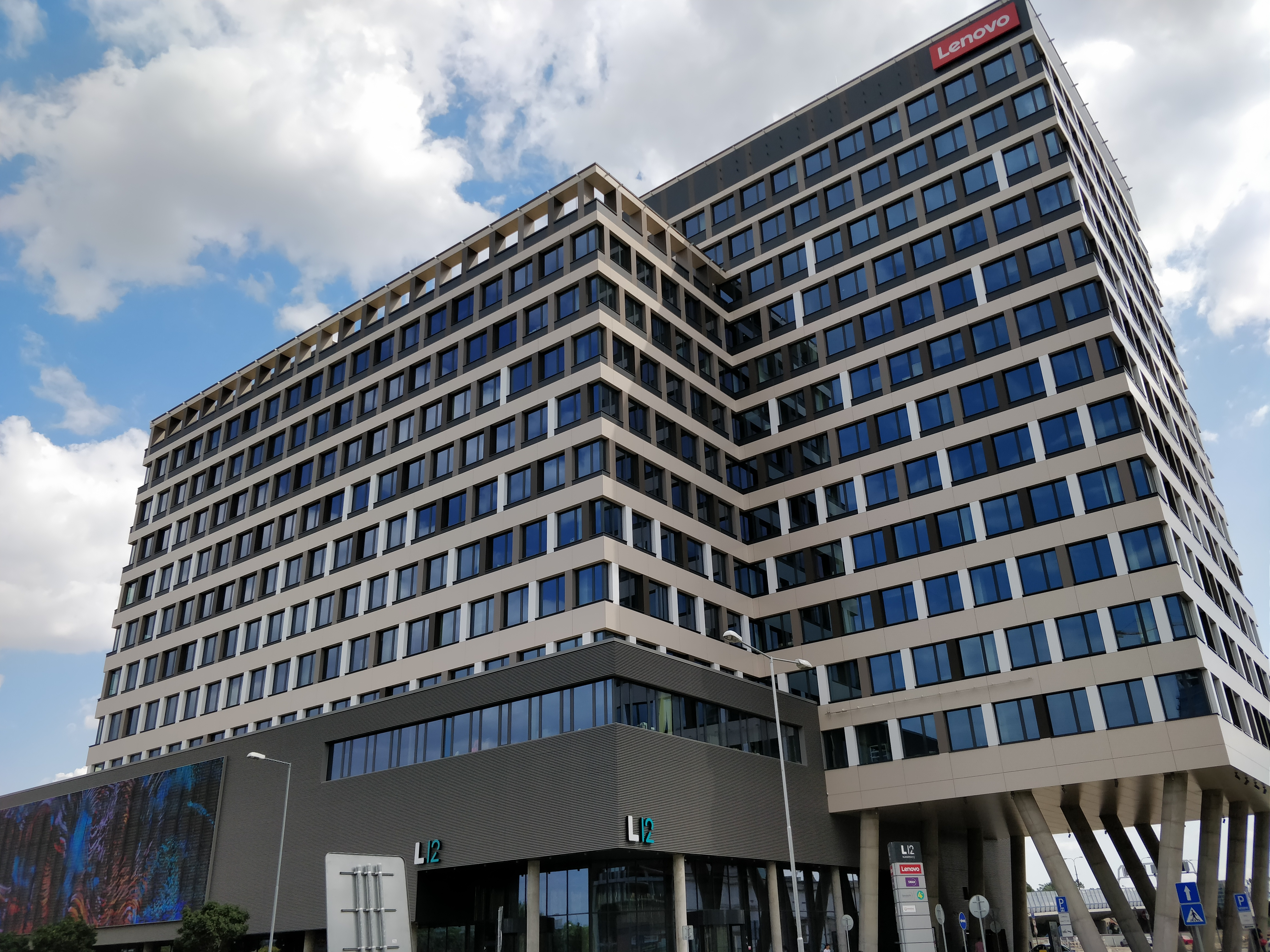 Landererova 12, Bratislava